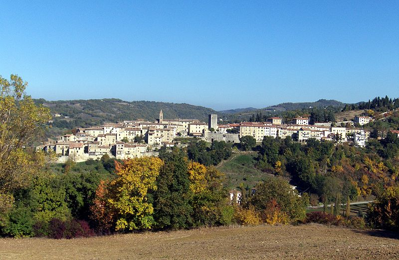 Panorama de Pietralunga Ombrie